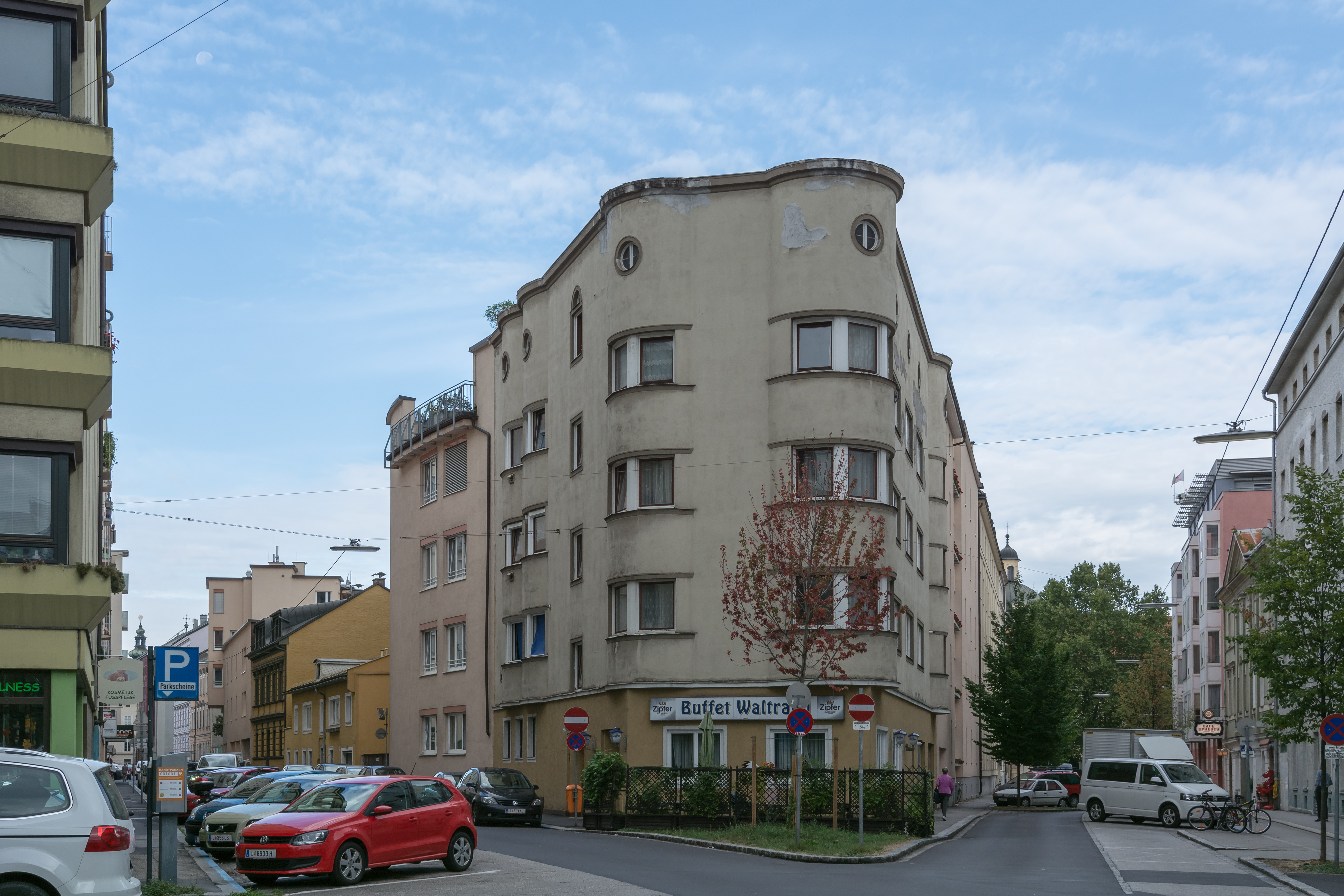 Miethaus